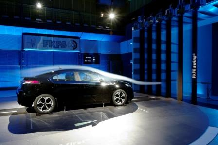 1:1-Fahrzeugwindkanal mit 5-Band-System